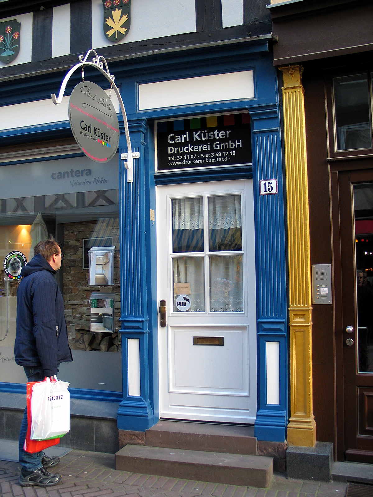 In der Altstadt von Hannover wirbt die Carl Küster Druckerei für ihre Dienste ...